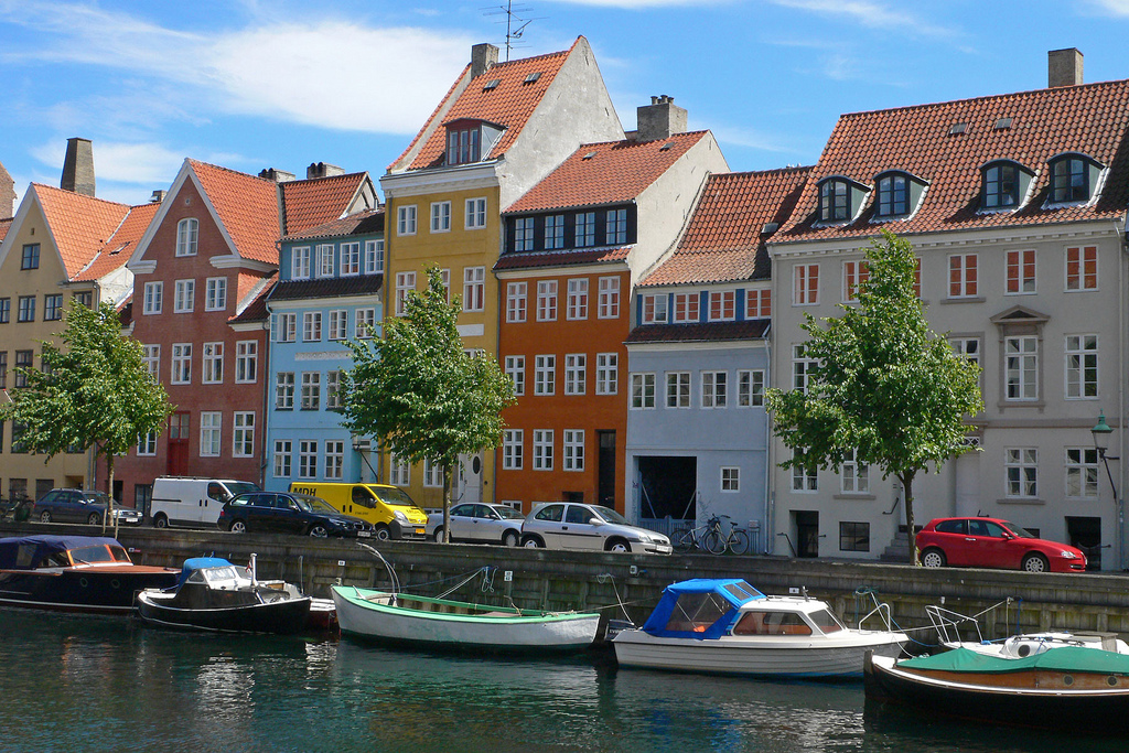 Overgaden Oven Vandet no. 18 - 28 in the Christianshavn district of Copenhagen, Denmark